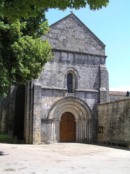 église St Vivien à Cherves-Richemont, Charente, France